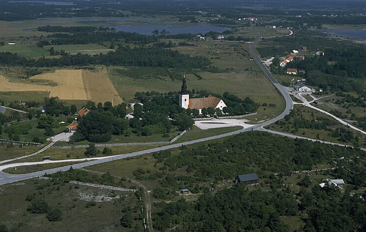 Motiv: Fårö kyrka Nyckelord: Flygbilder, Riksintressen Kategori: KyrkomiljöFårö kyrka